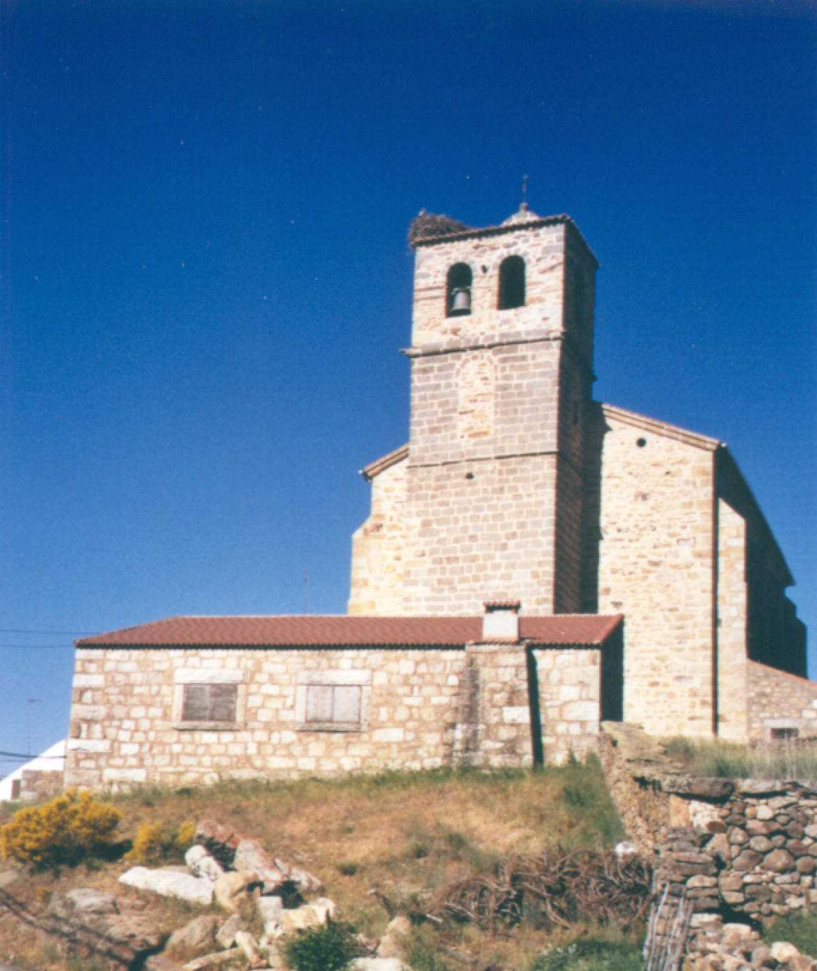 IGLESIA DE SAN MARTIN DE LA VEGA DEL ALBERCHE (ÁVILA; ESPAÑA)